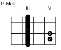 Eigenanfertigung